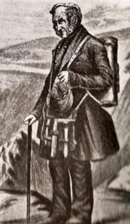 putování Dr.Antona Martiuse